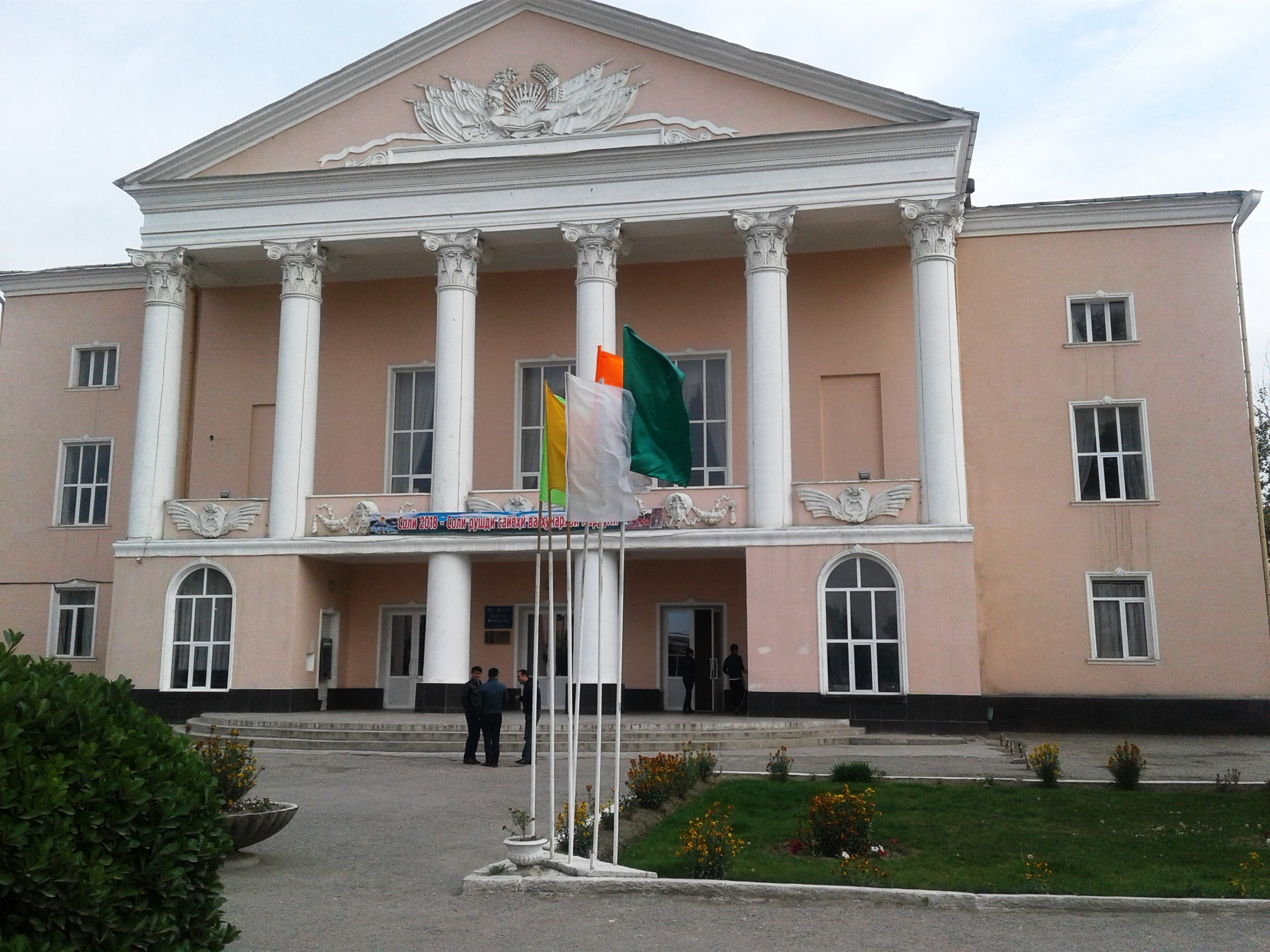 Город Исфара, Согдийская область, Таджикистан